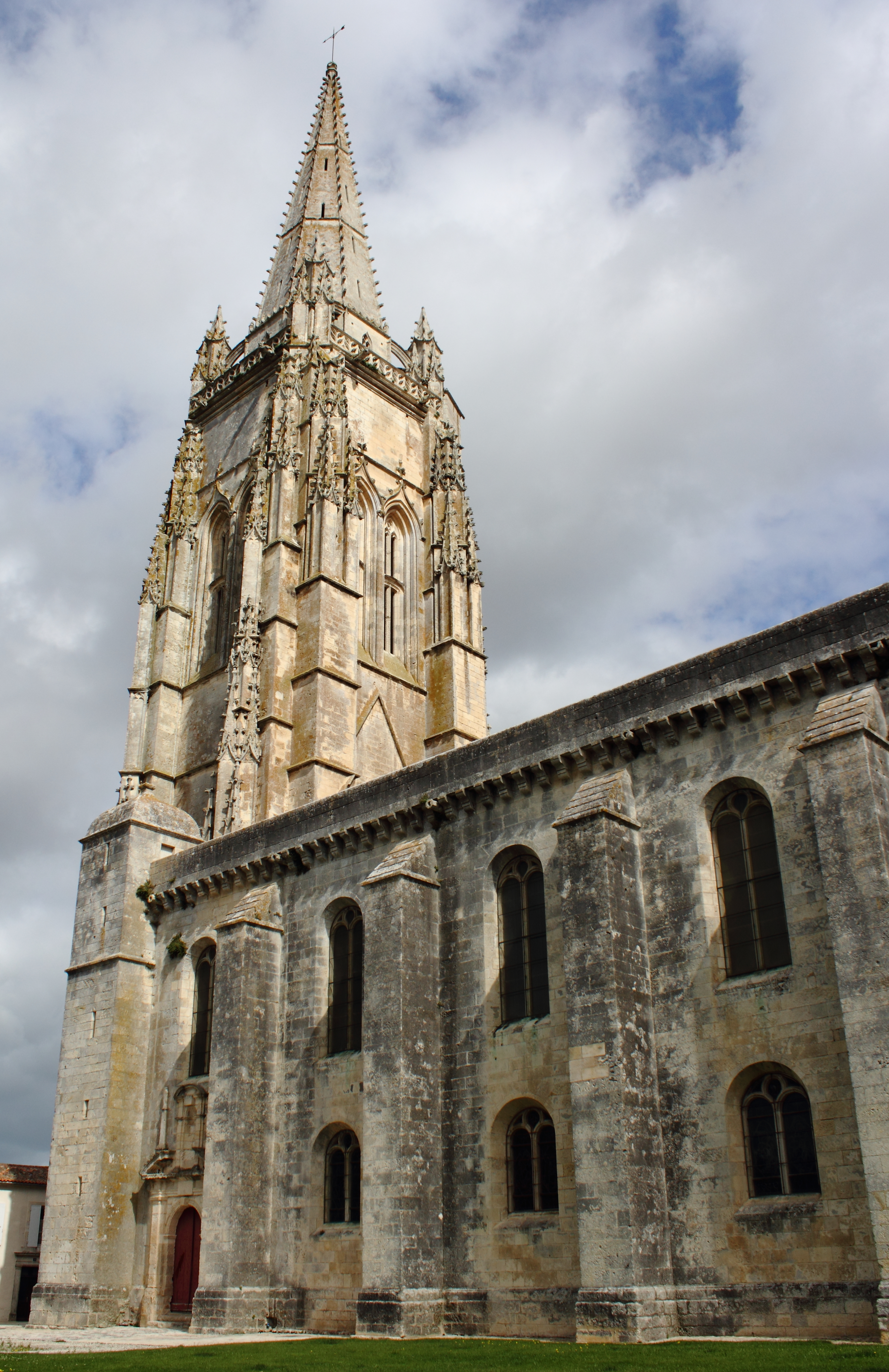 Église catholique édifiée sur la commune de Marennes